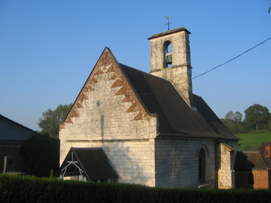 Eglise Notre-Dame de l'Assomption de Boubers-lès-Hesmond